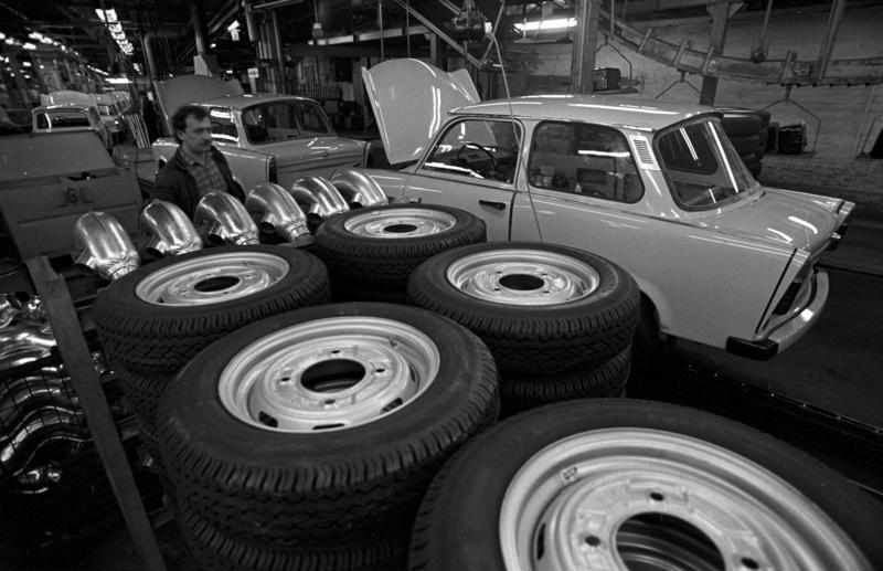 Zwickau, Trabi ade ADN/Wolfgang Thieme 15.7.90 Bez. Chemnitz: Trabi ade Nach über drei Jahrzehnten Produktion rollte der letzte Zweitakt-Trabant vom Band des Zwickauer Automobilwerkes. Nachdem die Limousinen-Produktion bereits vor Wochen eingestellt worden war, wurde nun der letzte "Universal"-Kombi montiert.